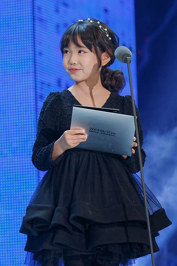 유상무 아역배우 김지영